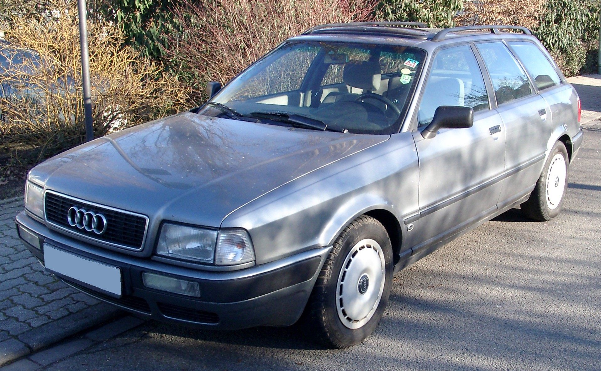 Audi 80 B4 Avant